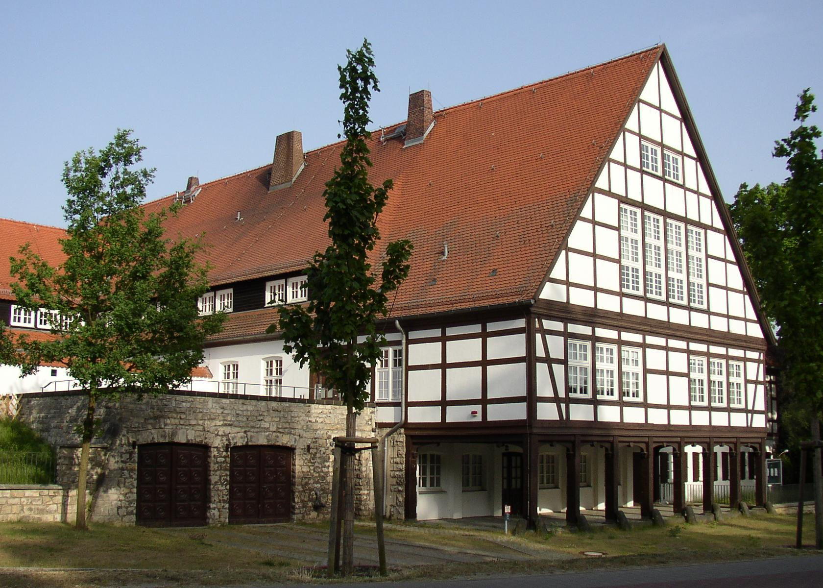 Vorlaubenhaus in Kleinmachnow in Brandenburg, Deutschland (am Stahnsdorfer Damm nördl. der Schleuse Kleinmachnow)